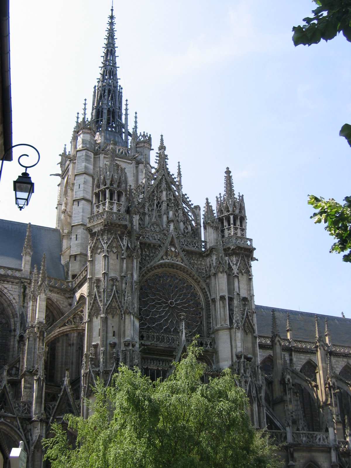 Cathédrale d'Evreux, Eure, Haute-Normandie : bras et rose du transept nord